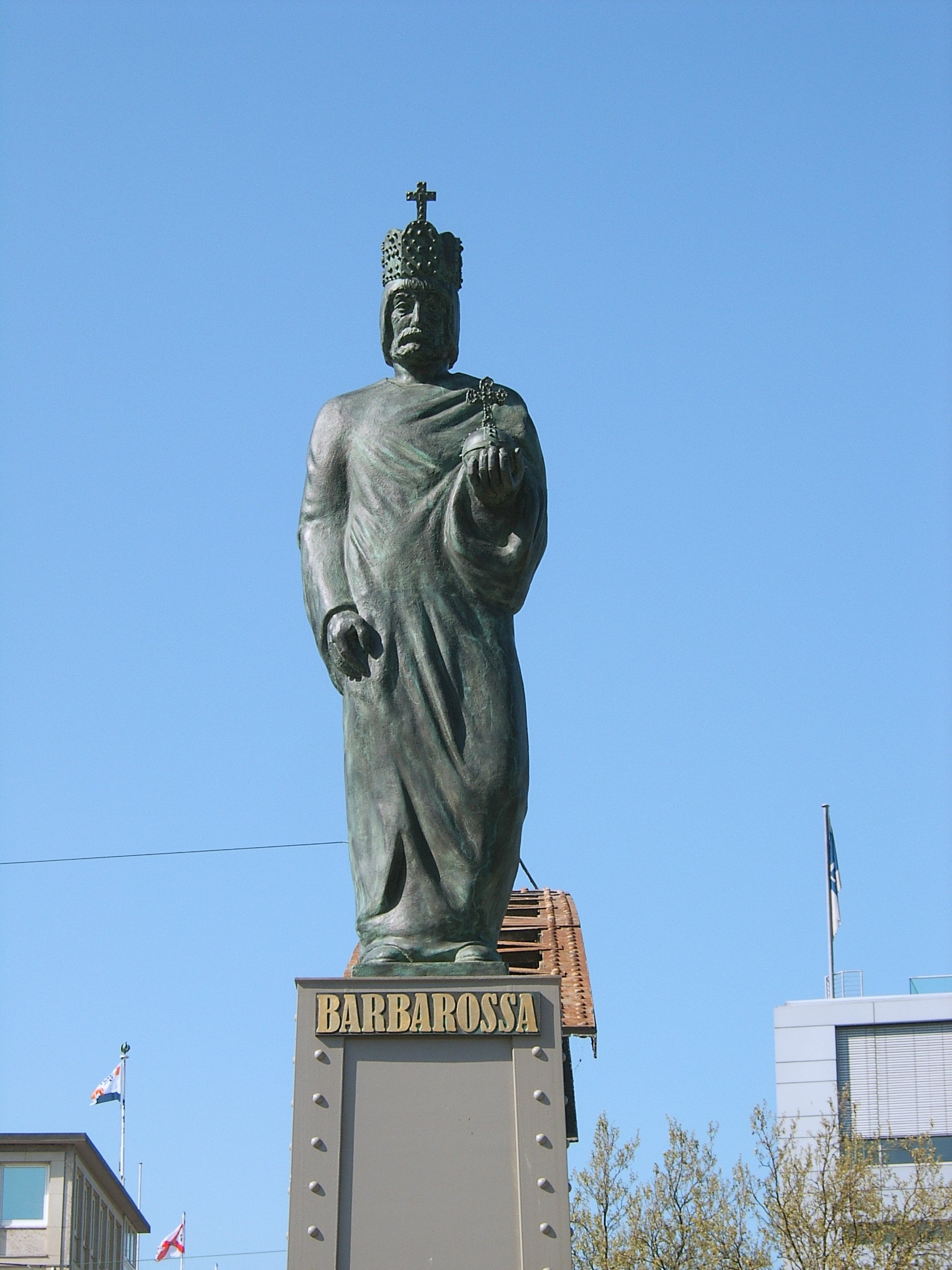 Barbarossa-Figur von Jörg Plickat auf der Brooksbrücke (Südseite, Speicherstadt) in Hamburg-HafenCity